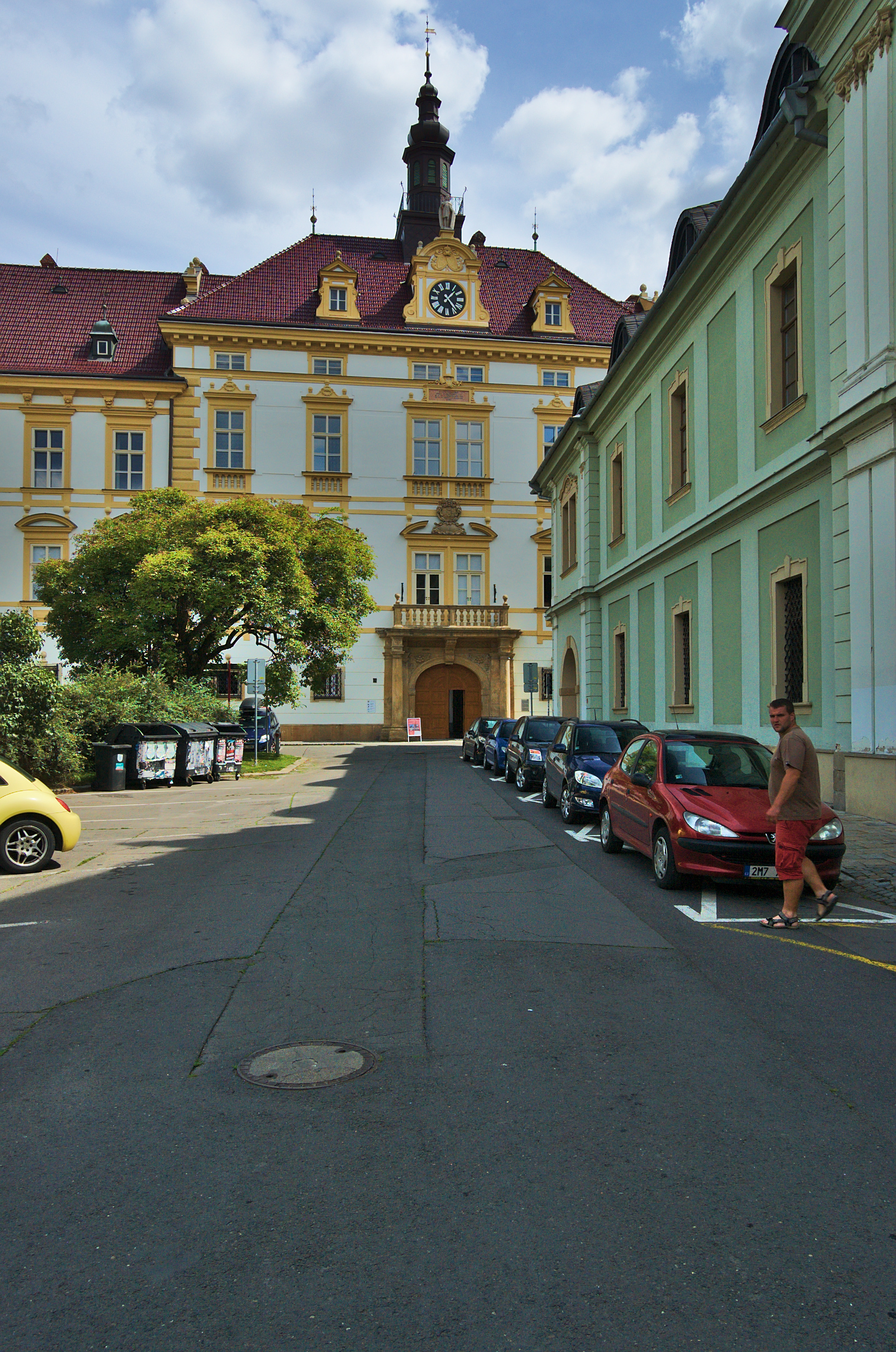 Arcibiskupský palác, čp. 562, Wurmova, Olomouc